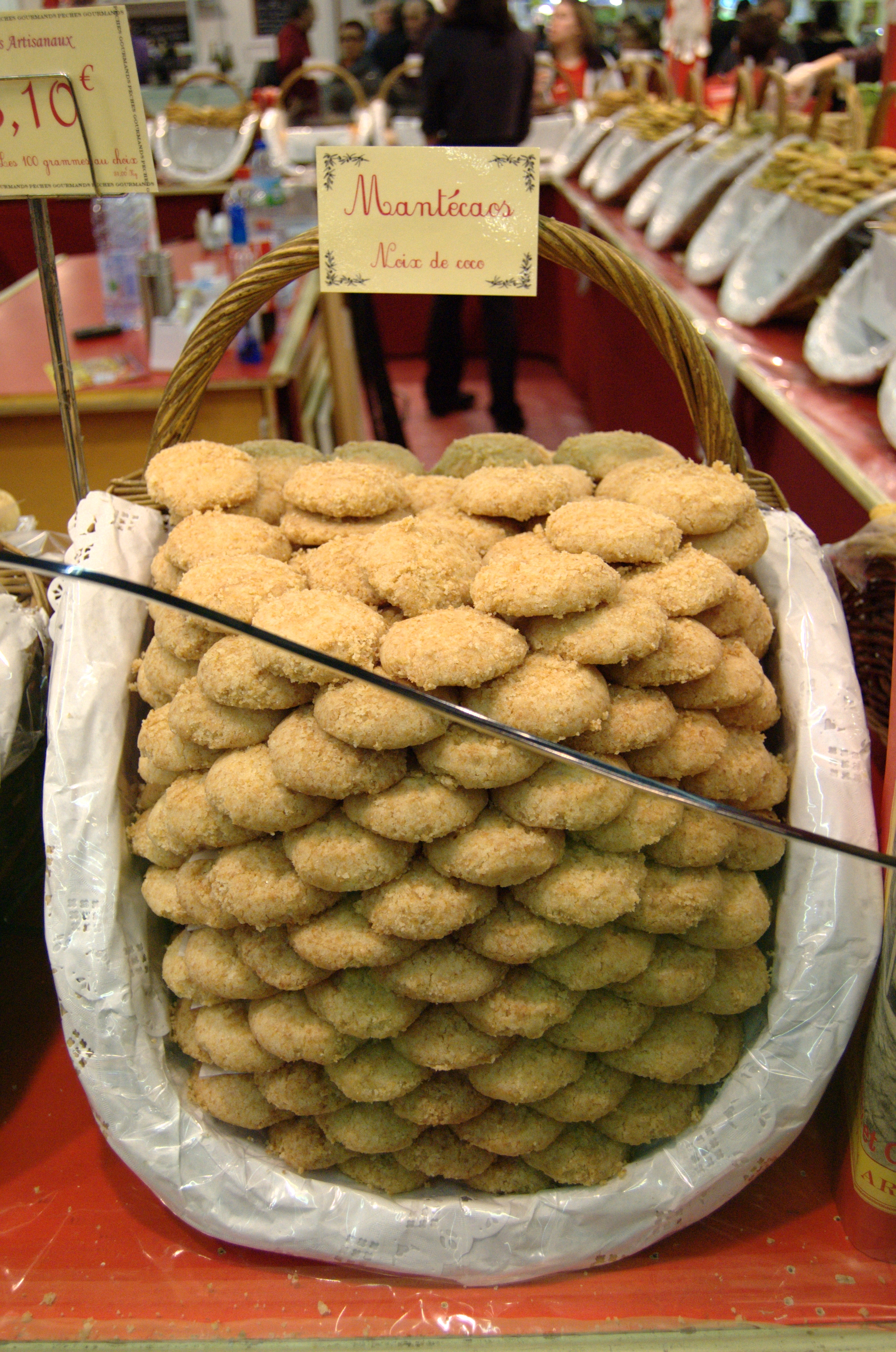 Stand vendant des Montecaos - Salon international de l'agriculture 2009 - Paris - France - 22 février 2009.